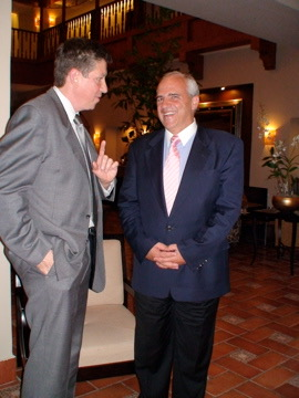 Raúl Benoit con el ex presidente de Colombia, Ernesto Samper.